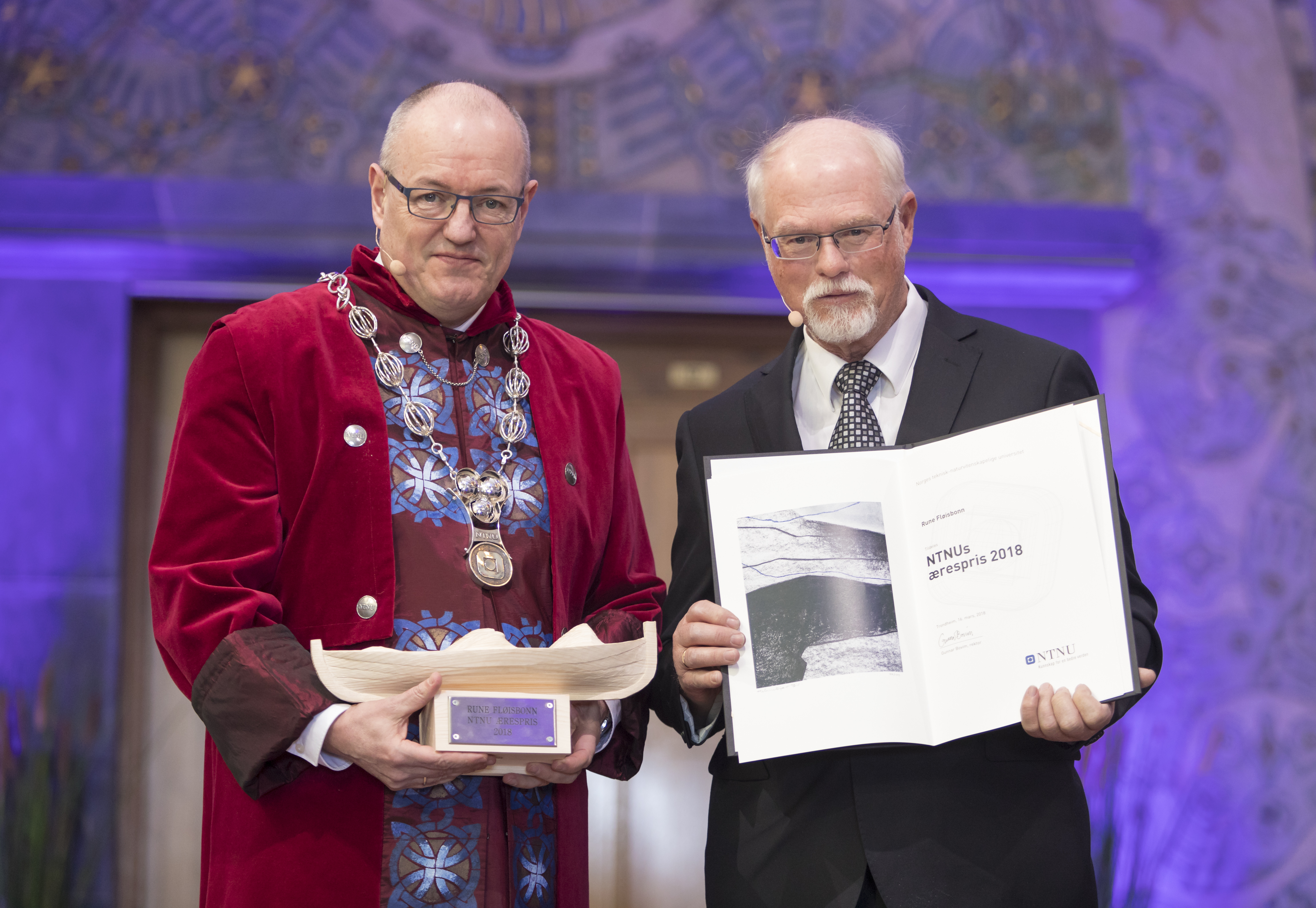 Trondheim 16.03.2018 : NTNU har festmøte i Hovedbyggets aula på Gløshaugen. Nye doktorer kreeres og æresdoktor utnevnes. Dr.h.c. Rune Fløisbonn mottar NTNUs ærespris, som deles ut for første gang. Foto